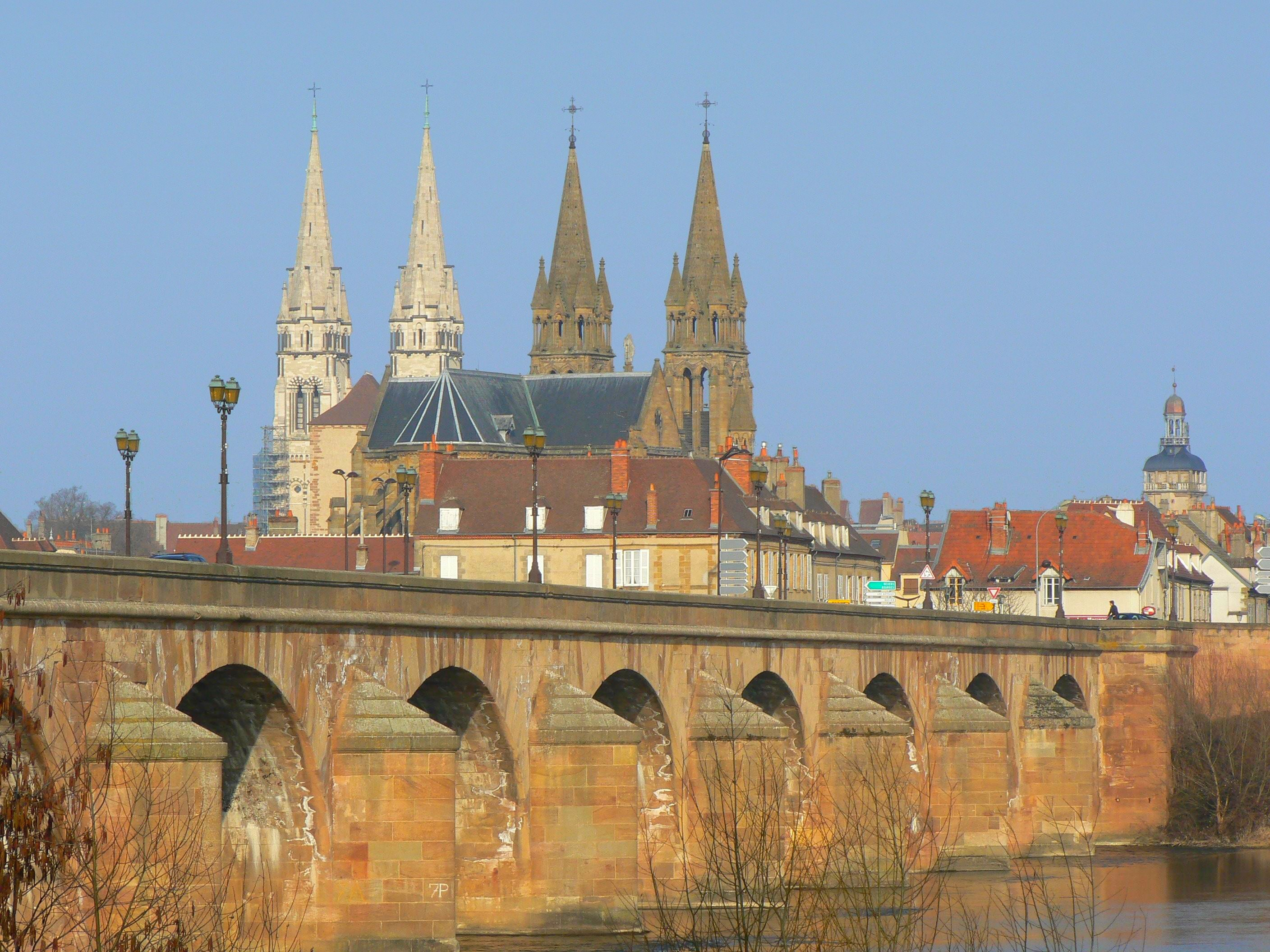 Vue depuis la rive gauche: Pont Règemortes, clochers du Sacré-Cœur, de la Cathédrale, et beffroi du Jacquemart